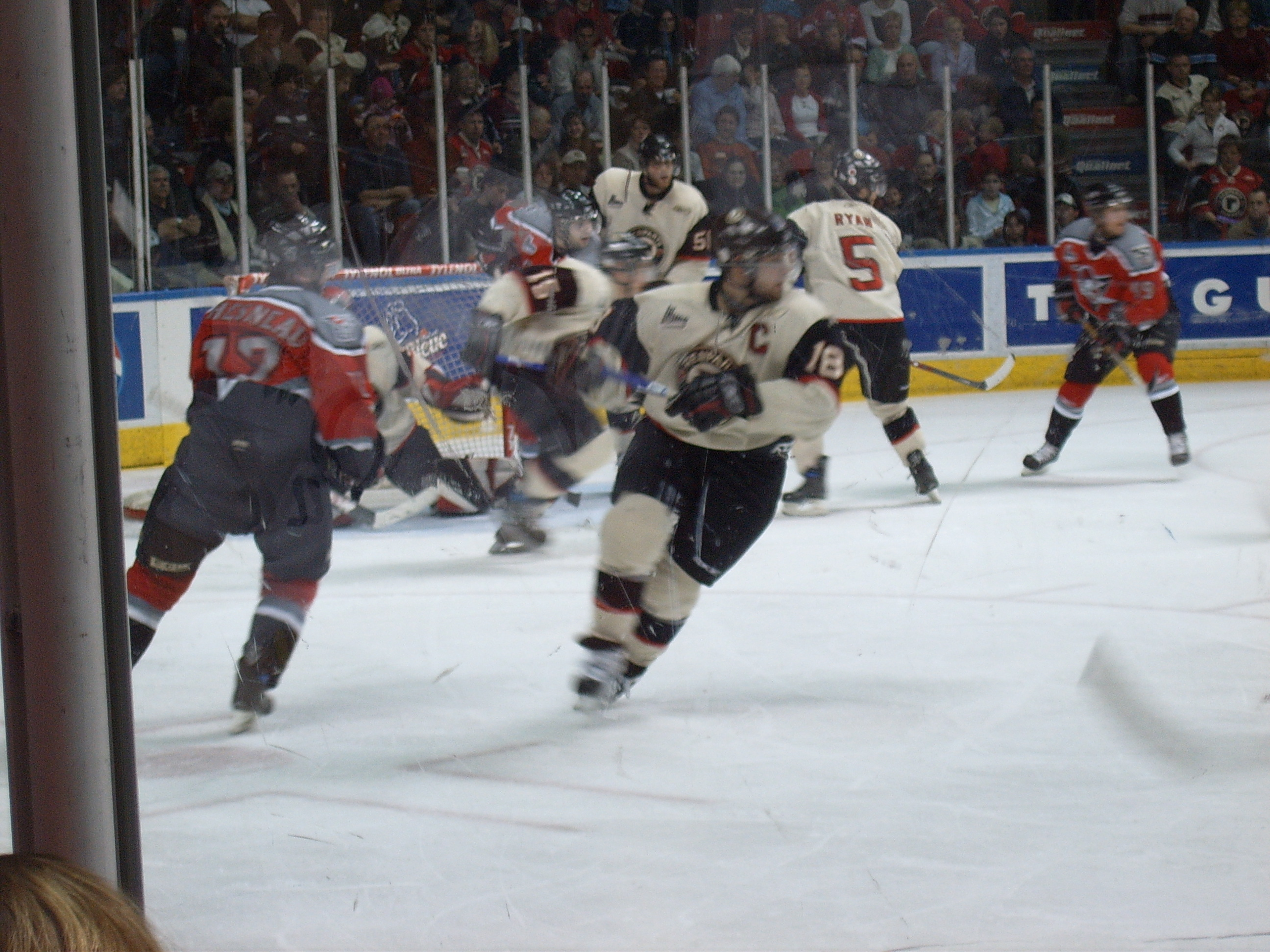 Action autour du filet des Remparts de Québec lors d'un match des séries éliminatoires de la LHJMQ les opposant aux Voltigeurs de Drummondville.